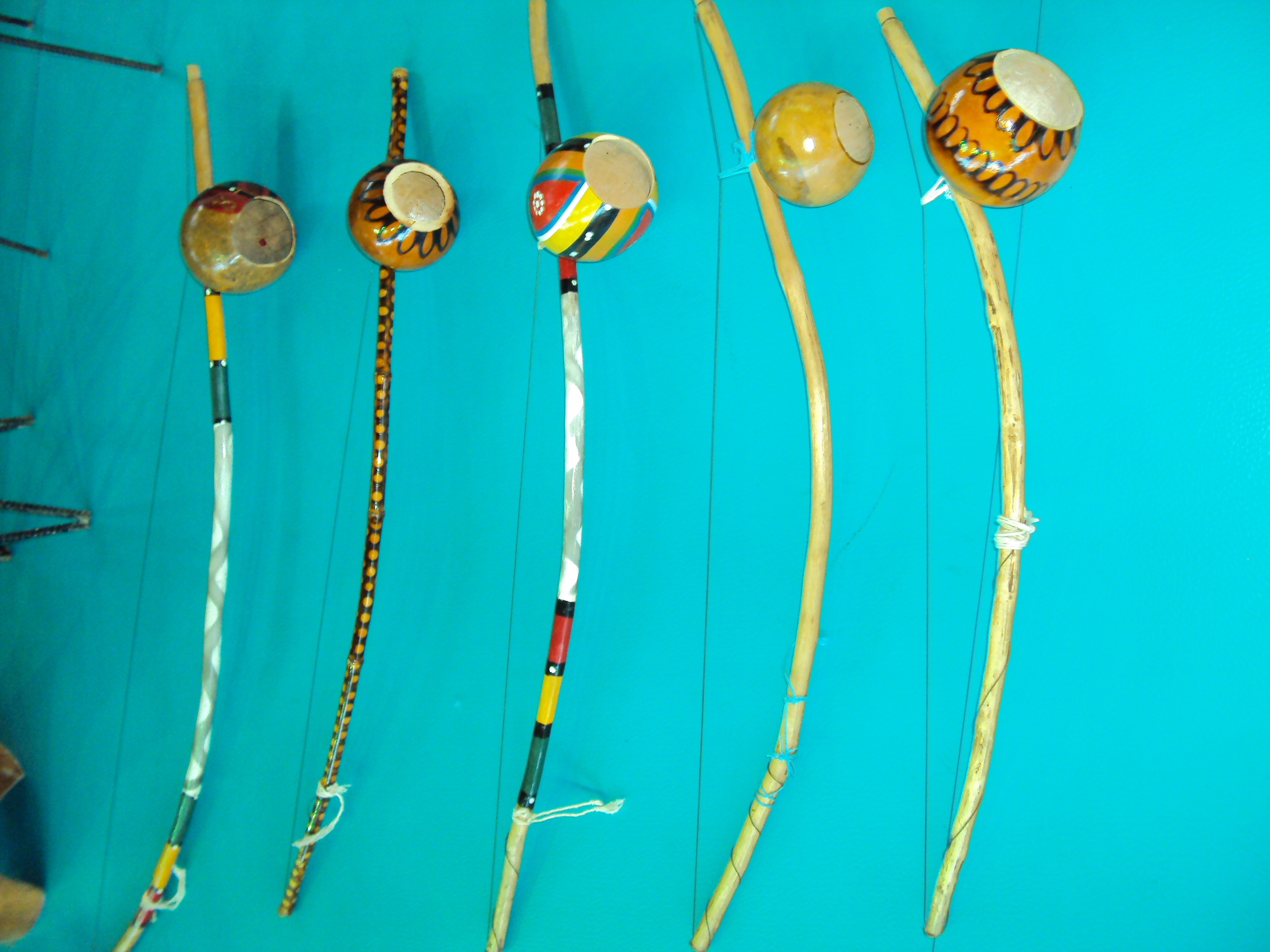 berimbau.